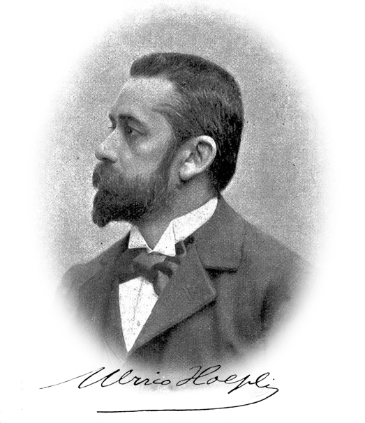 Ulrico Hoepli (1847–1935) Buchhändler und Verleger. Fotografie, Guigoni & Boffi, Mailand.